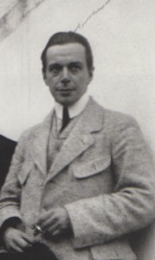 Ernst Ludwig Kirchner von dem Haus in den Lärchen, Sommer 1923